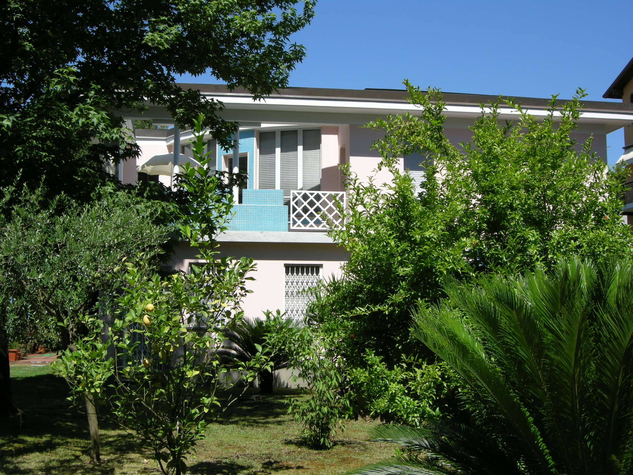 Condominio di viale roma 380 (Marina di Massa)